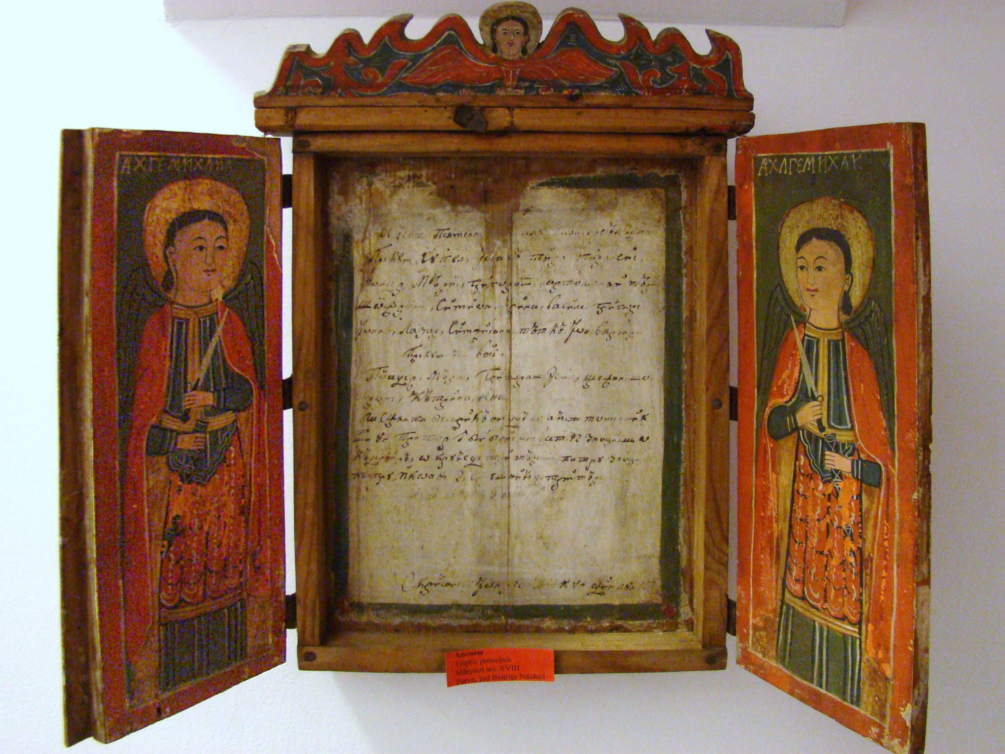 Pomelnic de le vechea biserică de lemn (dispărută) din Parva, Bistrița-Năsăud